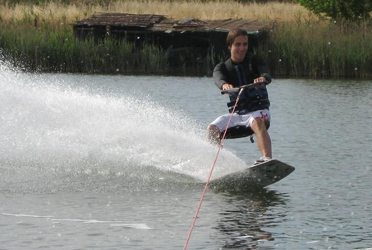 Un atleta che pratica wakeboard, fotografia amatoriale